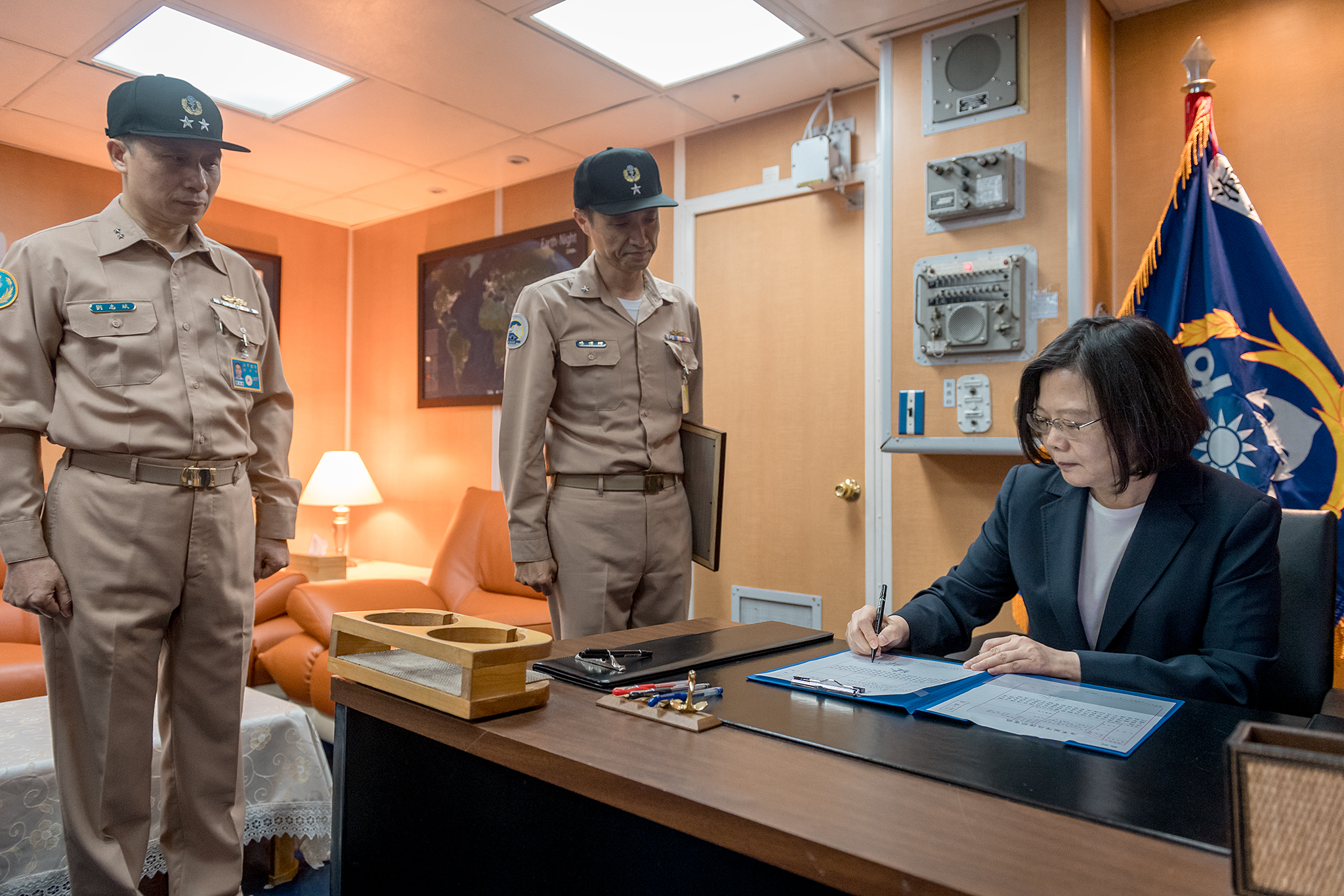 04.13 總統視導宜蘭海軍部隊